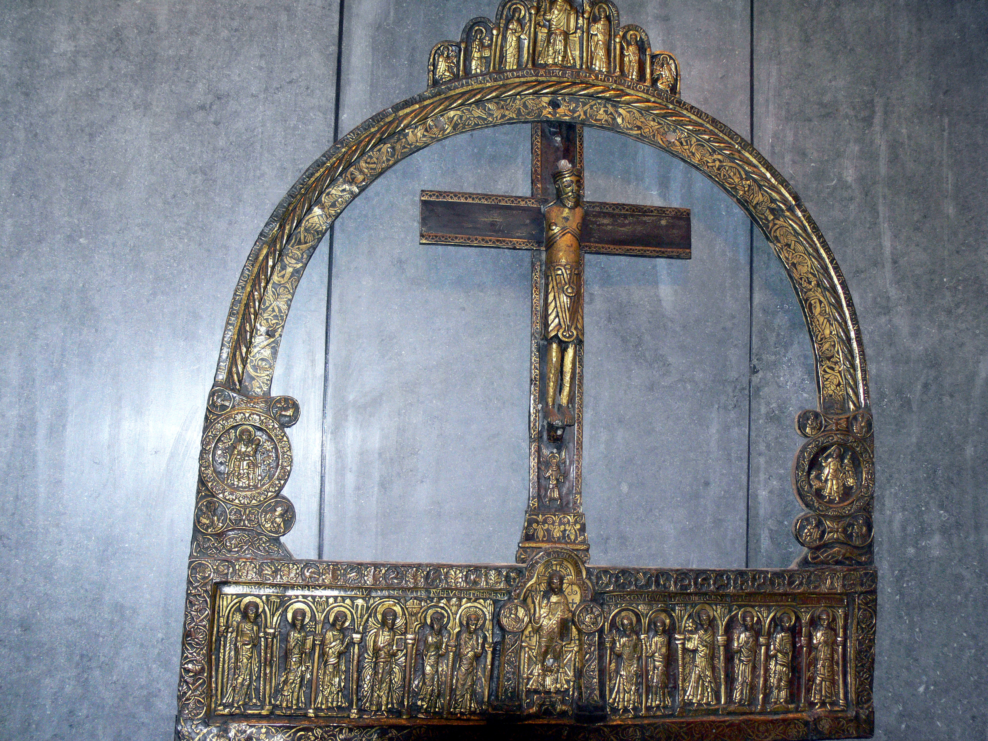 Lisbjerg_Altar, oberer Teil